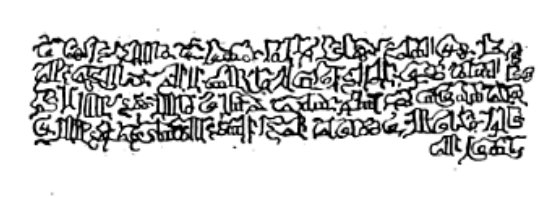 L'immagine proviene dal libro di Vella e pubblicato dall'Airoldi. Tale immagine sarebbe la scritta arabica dove si parlava di una spada del conquistatore di Siracusa: Busa ben Kagebis; custodita dentro una chiesa diventata mosche nel periodo arabo siracusano. Tale codice si è poi rivelato essere un falso.